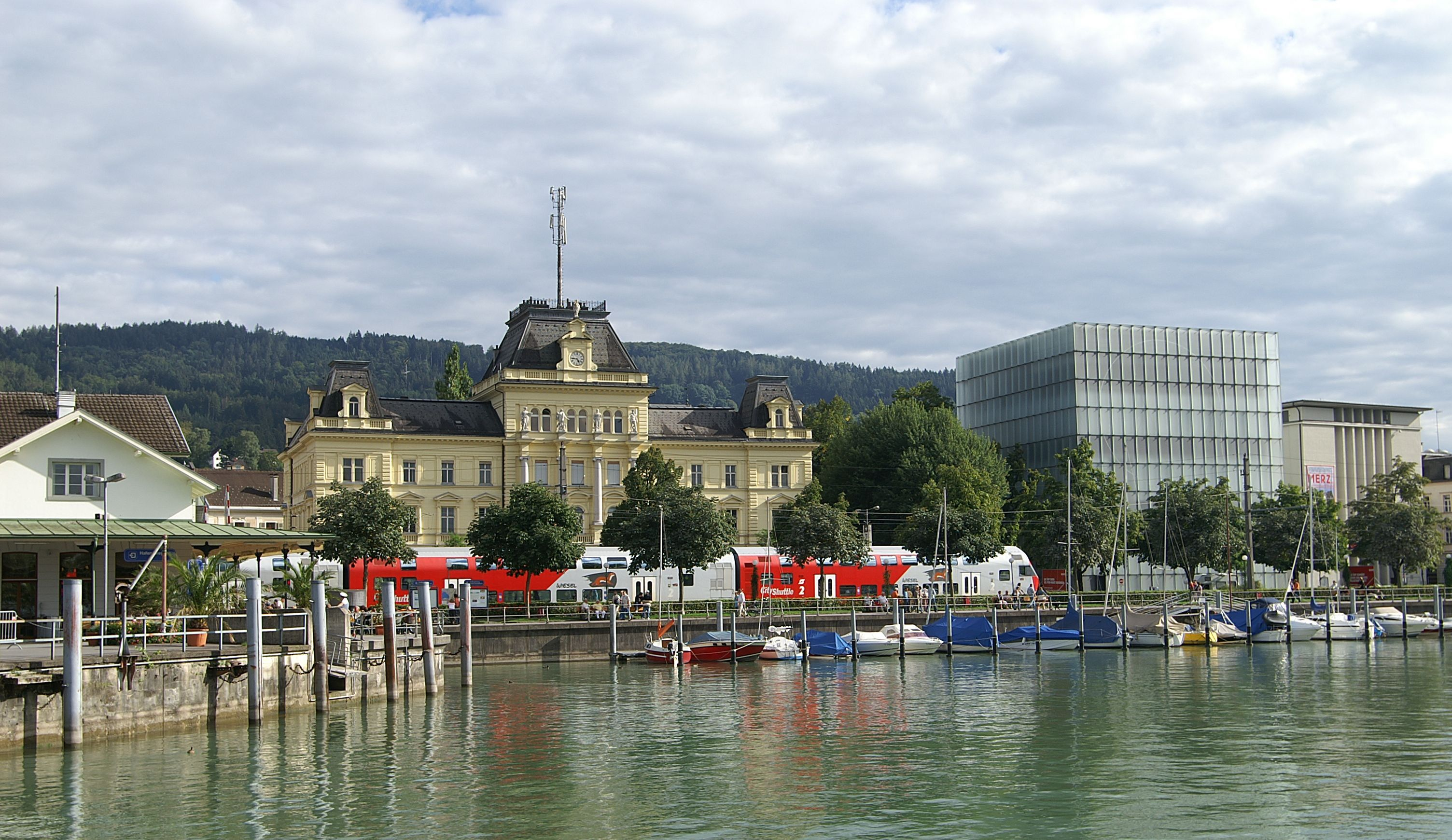 Bregenz Hafen mit Post, CUB, Kornmarkt